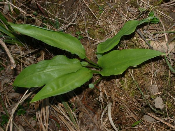 Ail des ours, Gy.